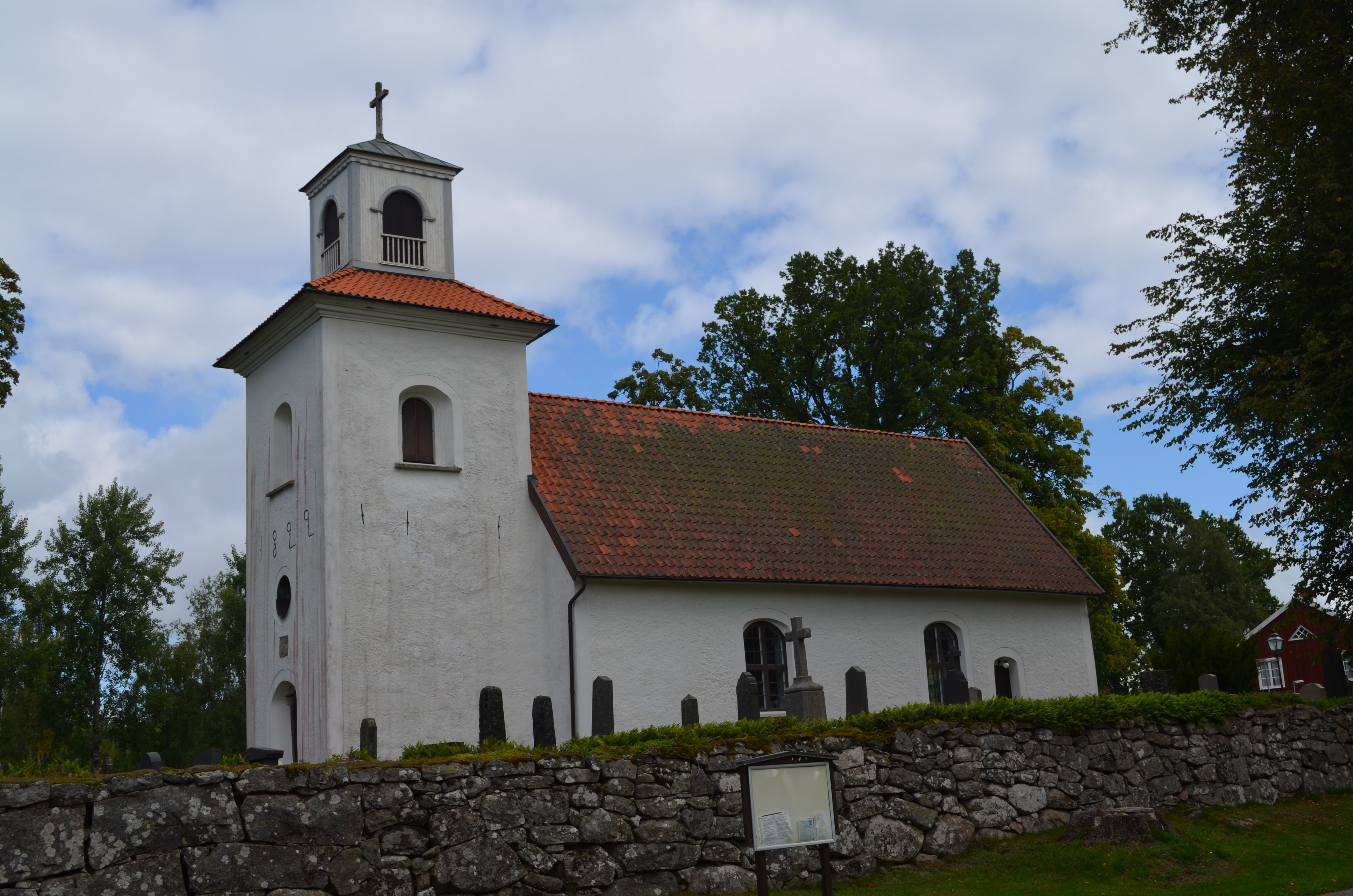 Gryteryds kyrka